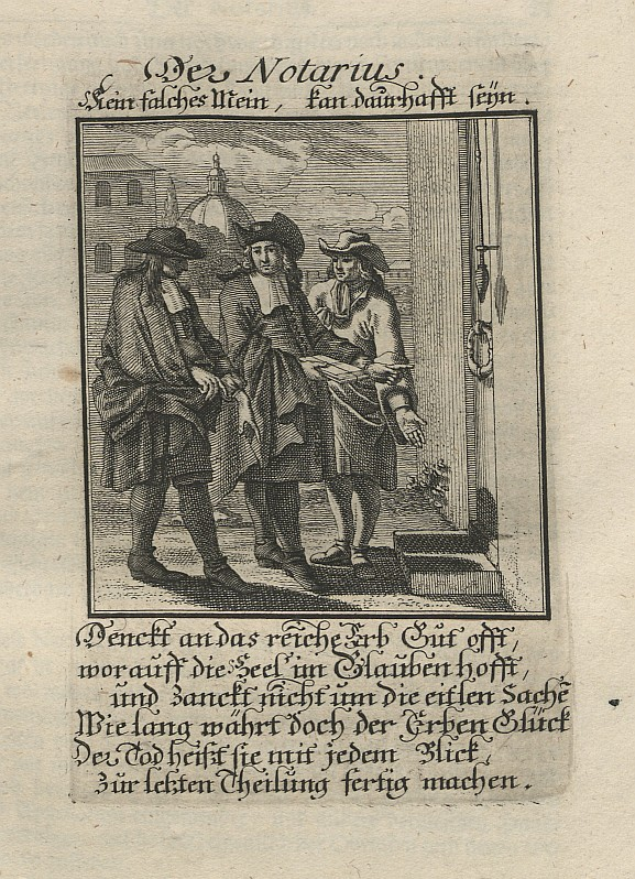 Original image description from the Deutsche Fotothek Ständebuch & Amt & Notar & Jurist